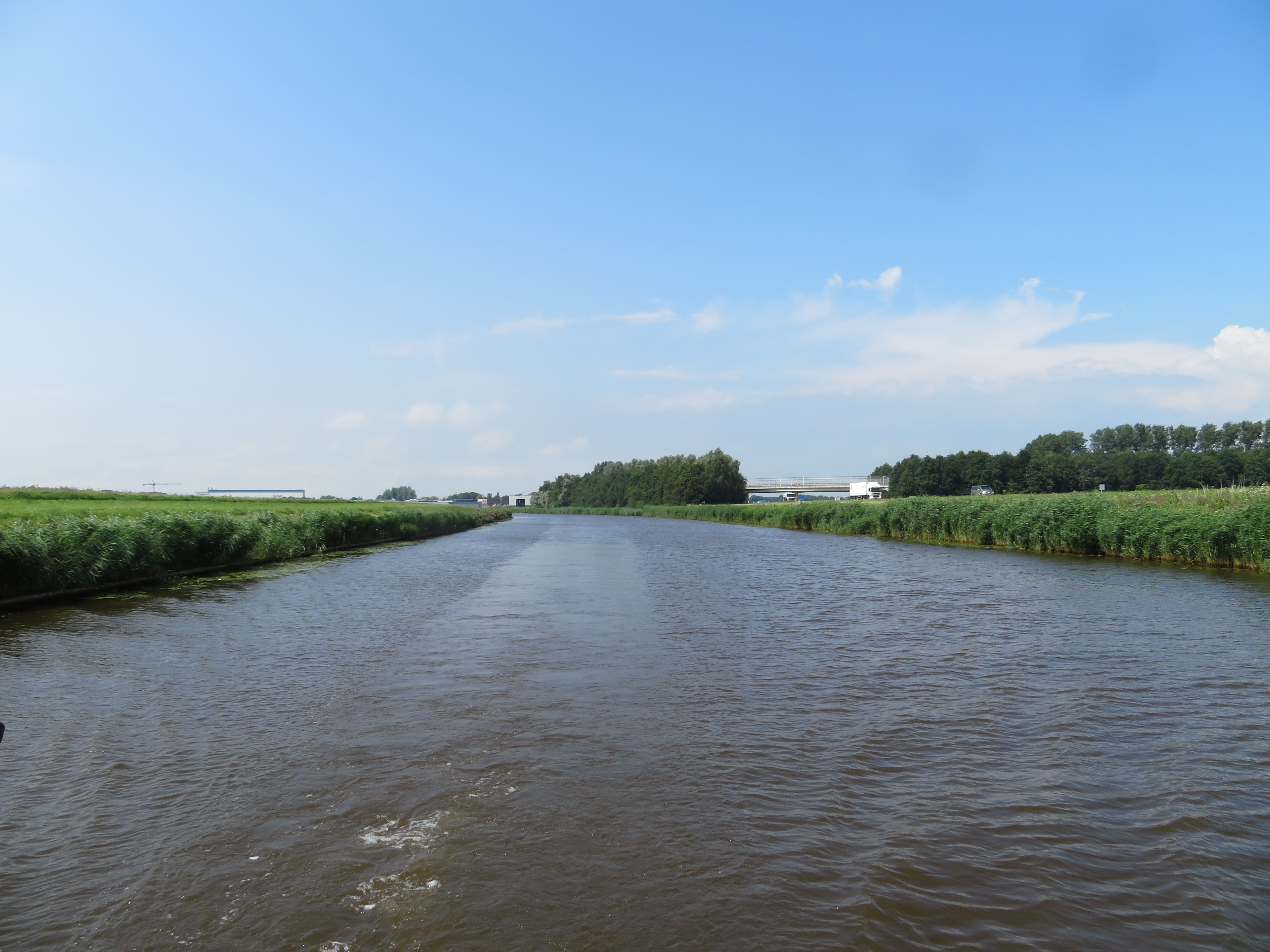 Lemstervaart in Flevoland